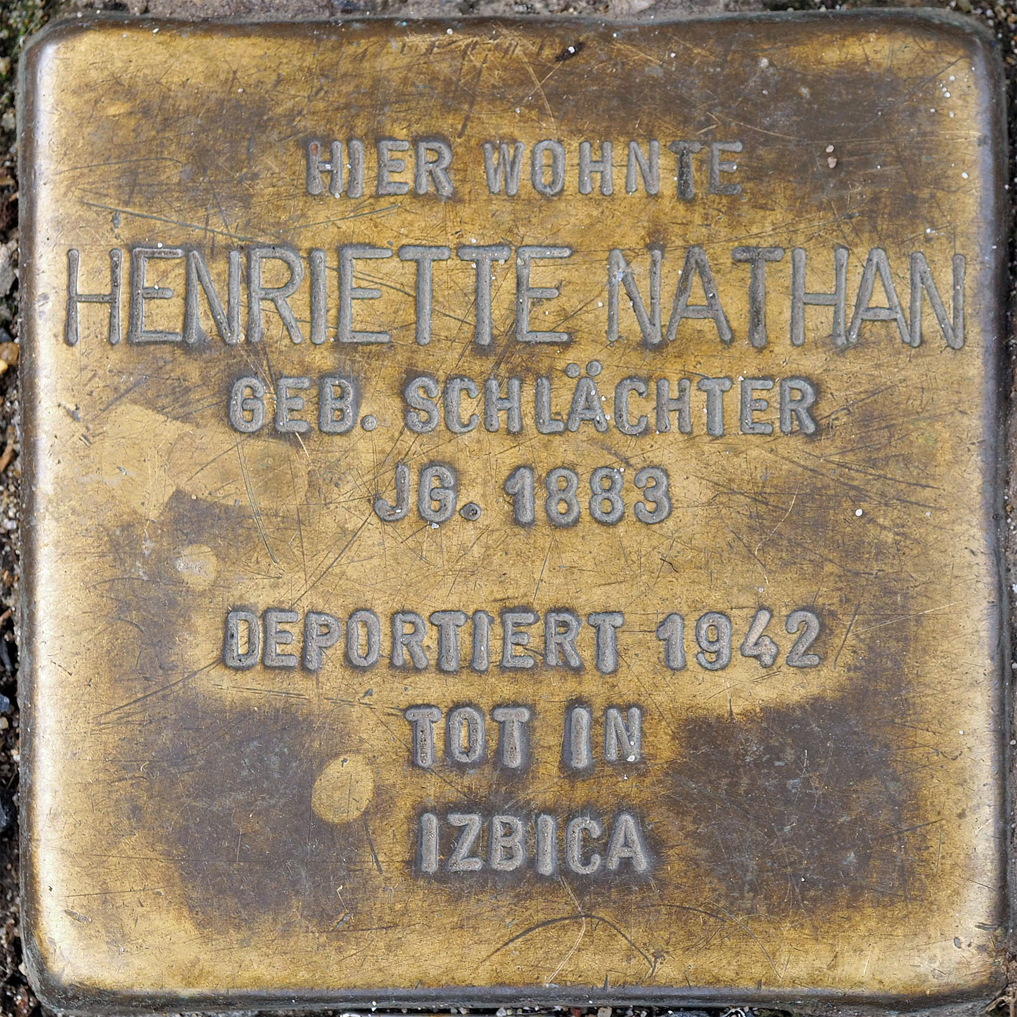 Stolpersteine MG: Nathan, Henriette